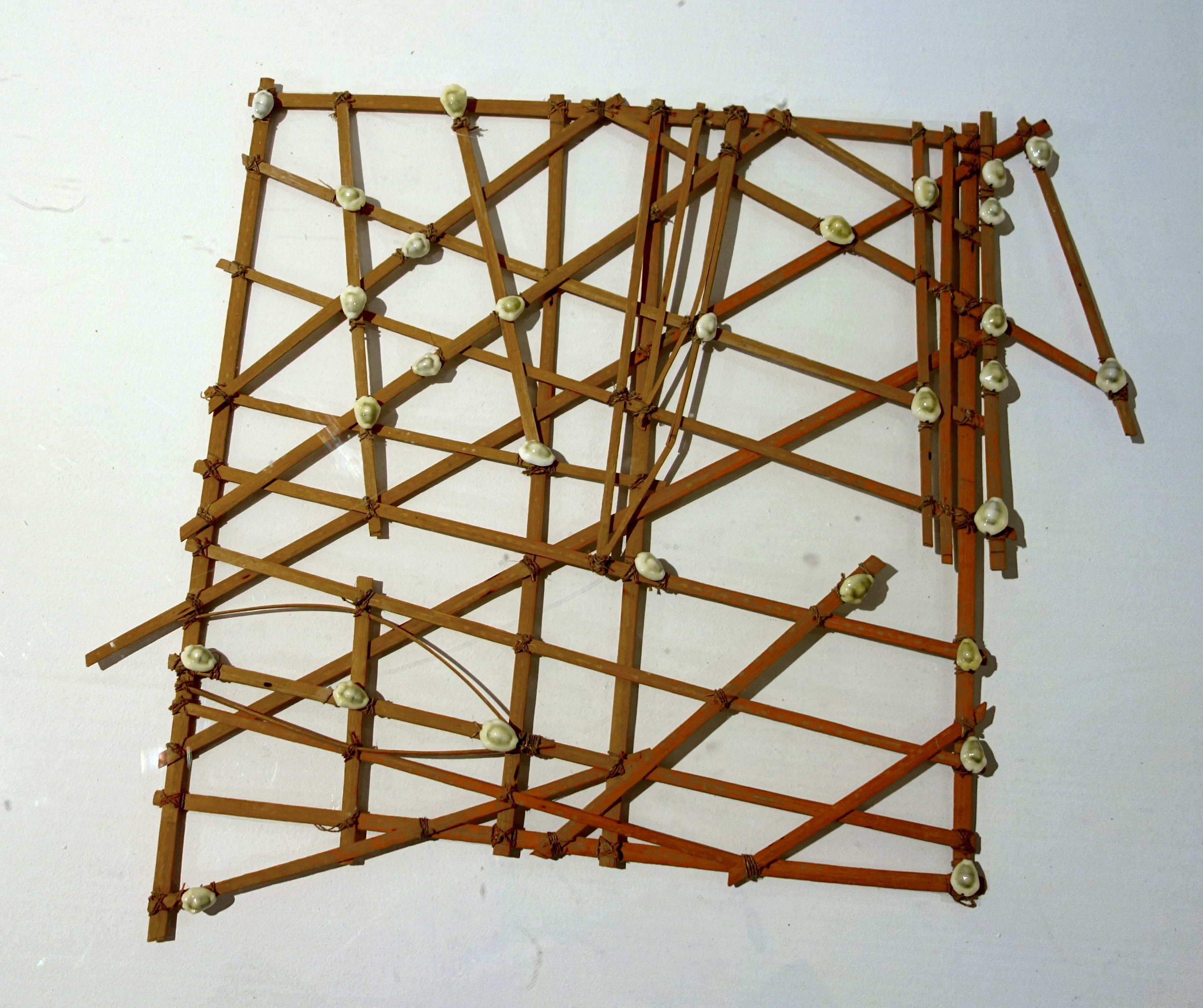 Carte de navigation de l'archipel des Iles Marshall au musée du quai Branly.